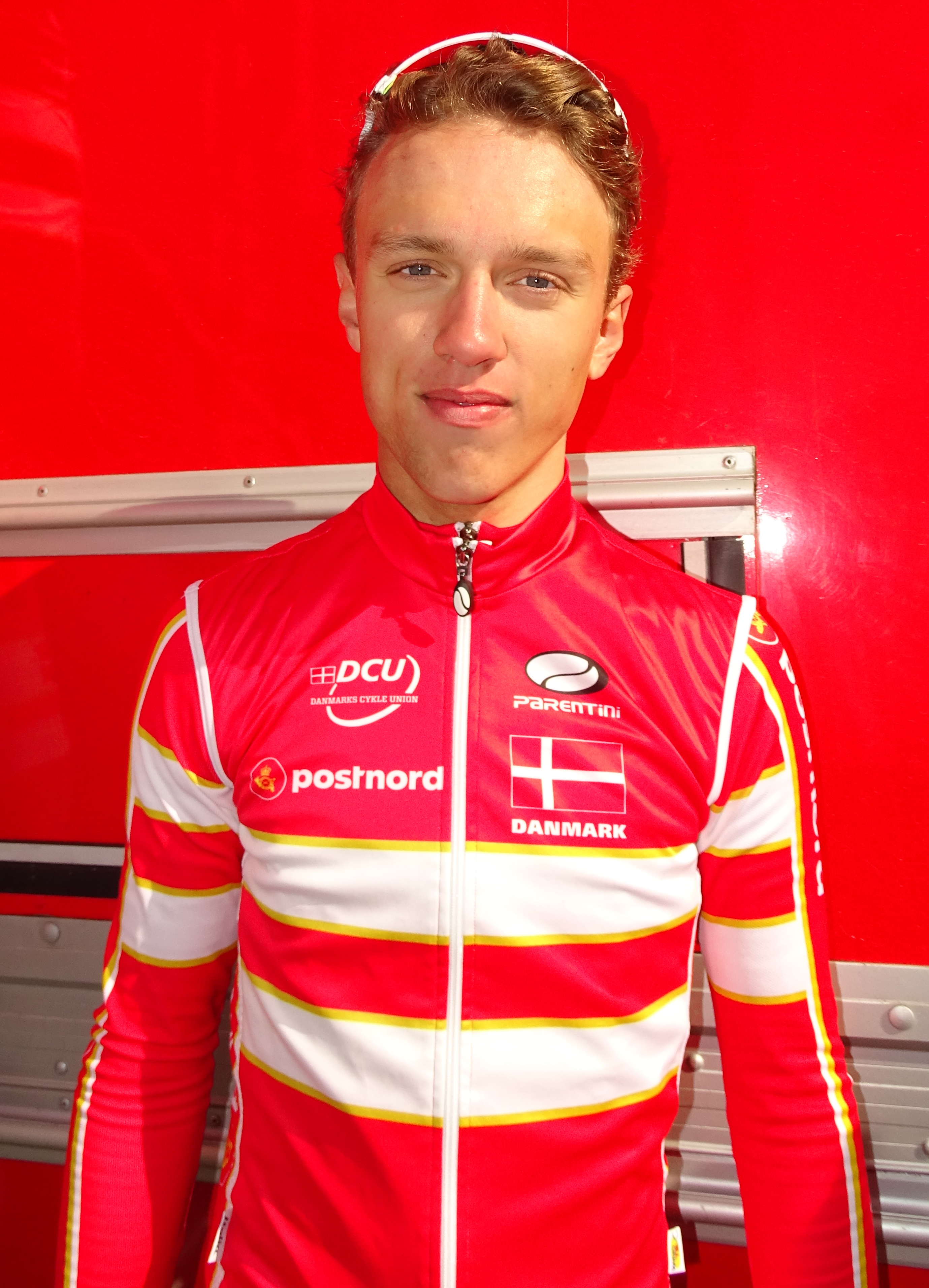 Reportage réalisé le dimanche 10 avril à l'occasion du départ du Paris-Roubaix juniors 2016 à Saint-Amand-les-Eaux, France.